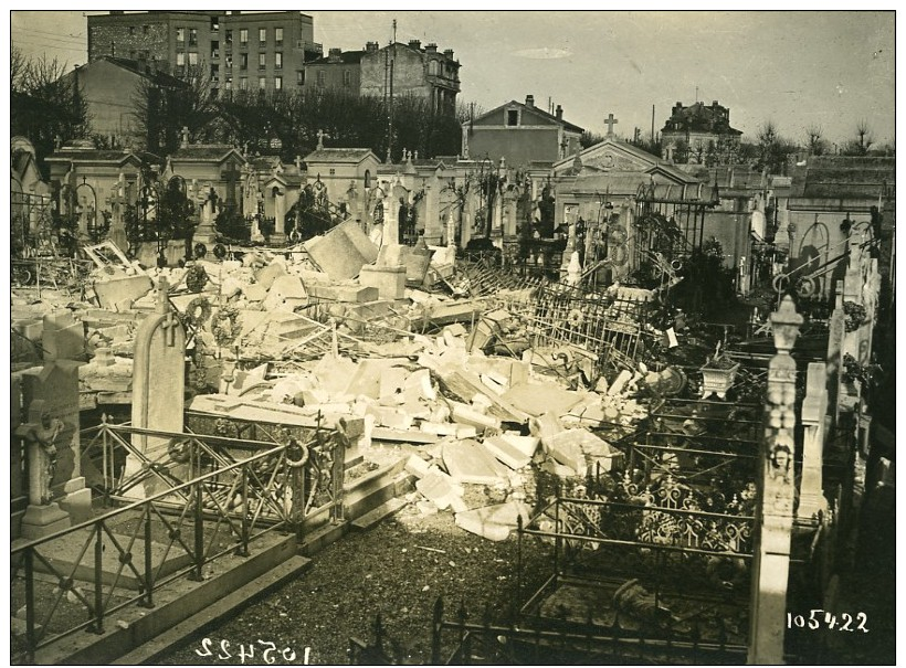 Père Lachaise : dégâts dus aux bombardements de 1918